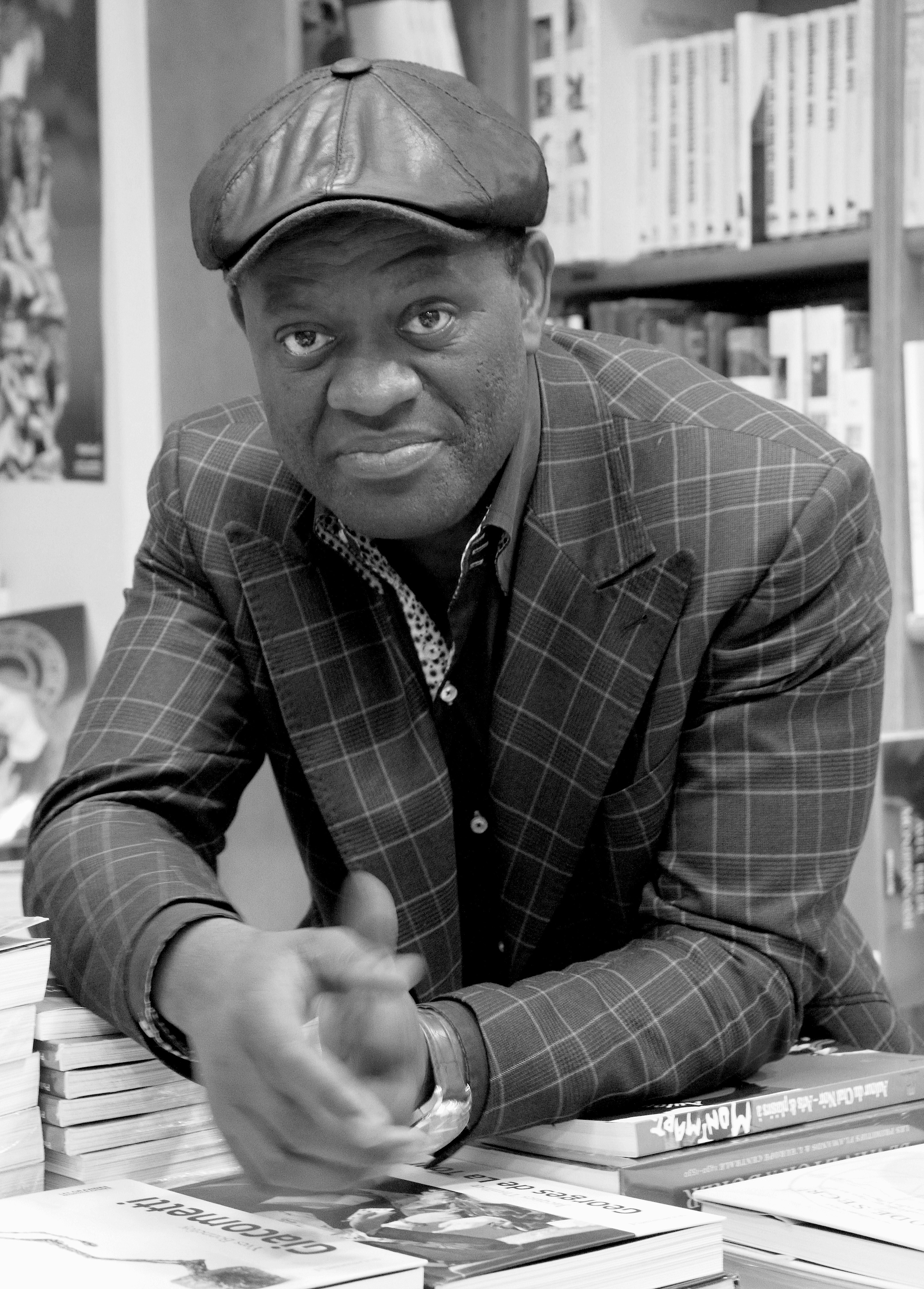 Alain Mabanckou en janvier 2013